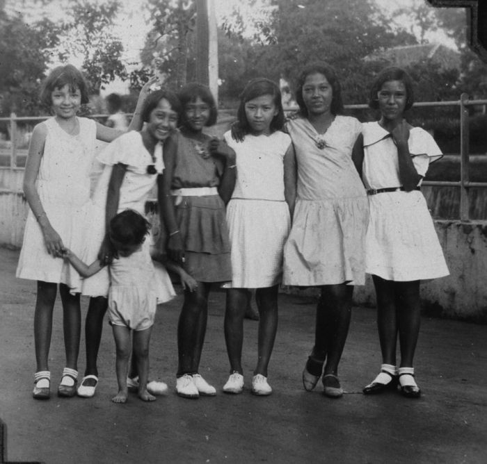 Foto. Sekelompok remaja putri Indo di Batavia